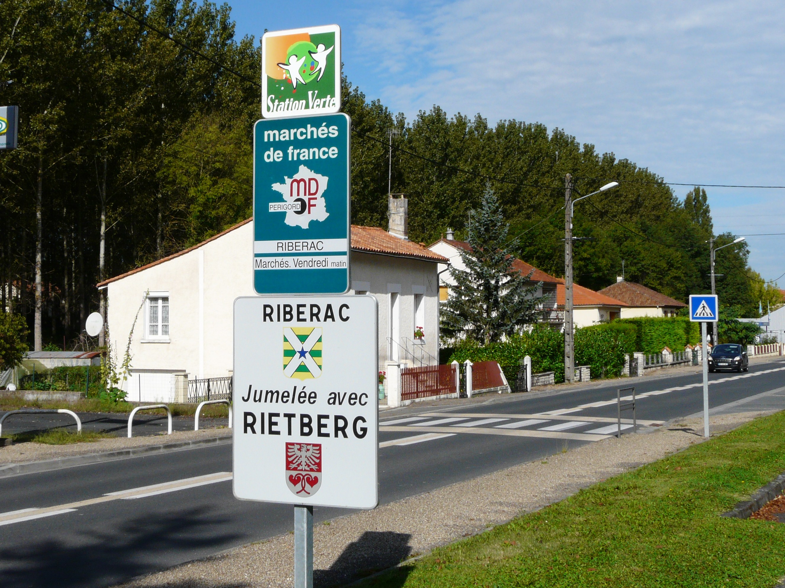 Panneau de jumelage à Ribérac, Dordogne, France.